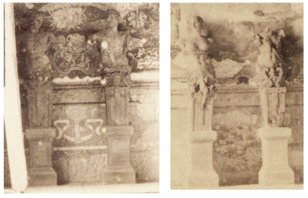 Termes en terre cuite du château d'Orion, visibles adossés au mur ouest de la galerie du château dans une cliché de Jules Robuchon (1840-1922) prise à la fin du XIXe siècle. collection privée.